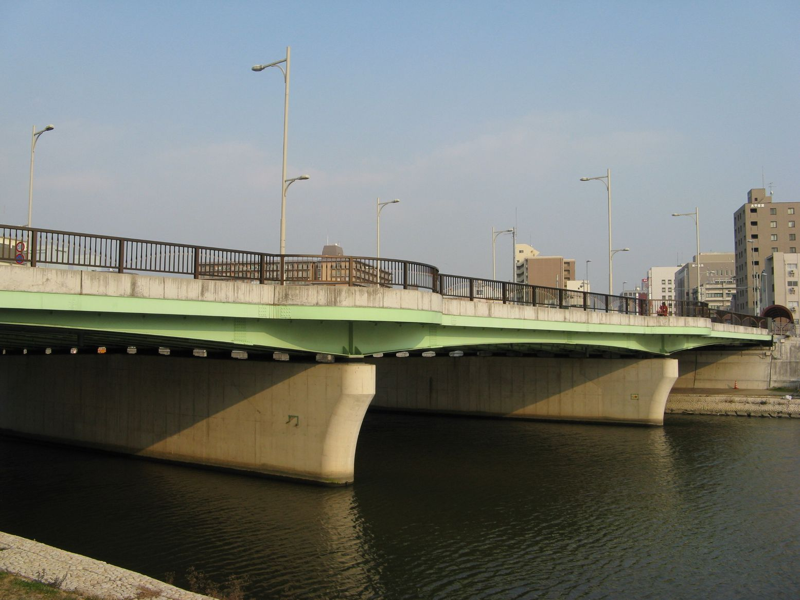 明石大橋 西岸から明石市街を望む